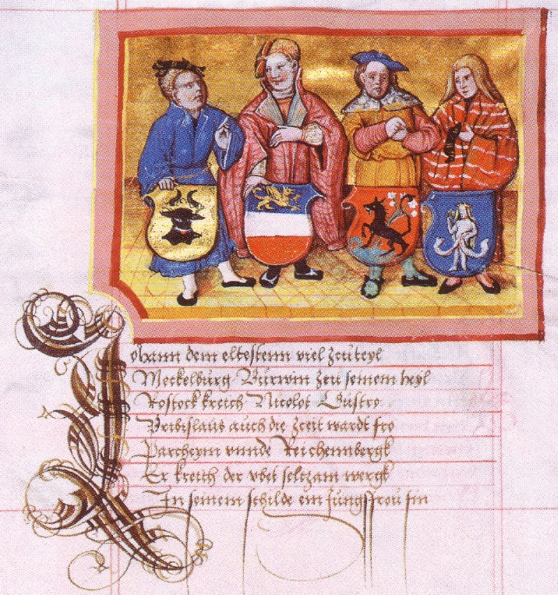 Landesbibliothek Mecklenburg-Vorpommern, Ms. 376, folio 62. Erste Hauptlandesteilung 1229 unter den vier Enkeln Heinrich Borwins I. Von links: Mecklenburg, Rostock, Güstrow, Parchim/Richenberg Text: Johann dem eltestenn viel zcuteyl Meckelburg, Burwin zcu seinem heyl Rostock kreich, Nicolot Güstro, Pribislaus auch die zceit wardt fro, Parcheym vnnde Reichennbergk Er kreich, der vbet seltzam wergk In seinem Schilde ein Jungffrou fin ... cf. (XLV.)